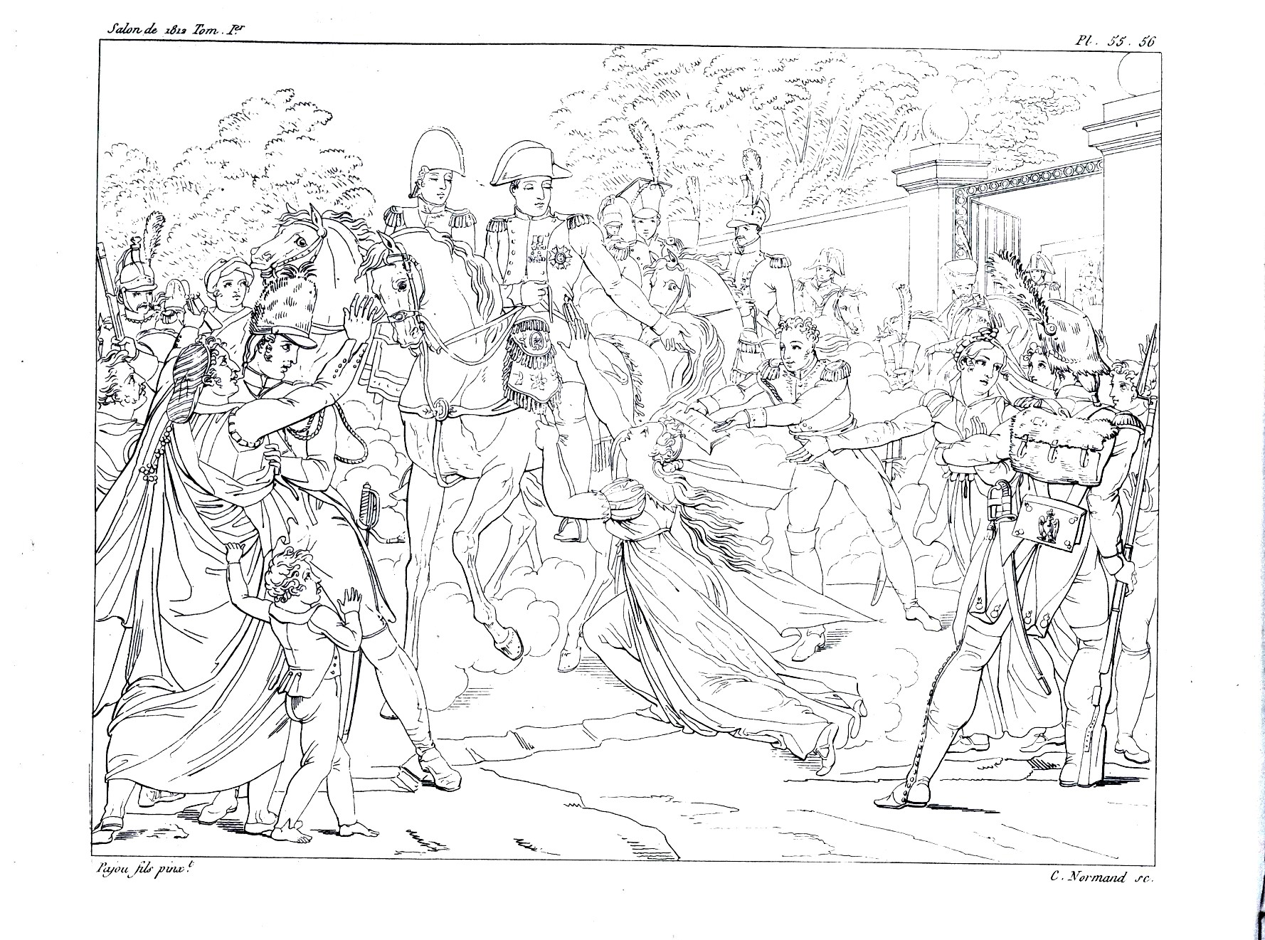 Jacques Augustin Catherine Pajou Clémence de S. M. l'Empereur et Roi, envers M. de Saint-Simon.